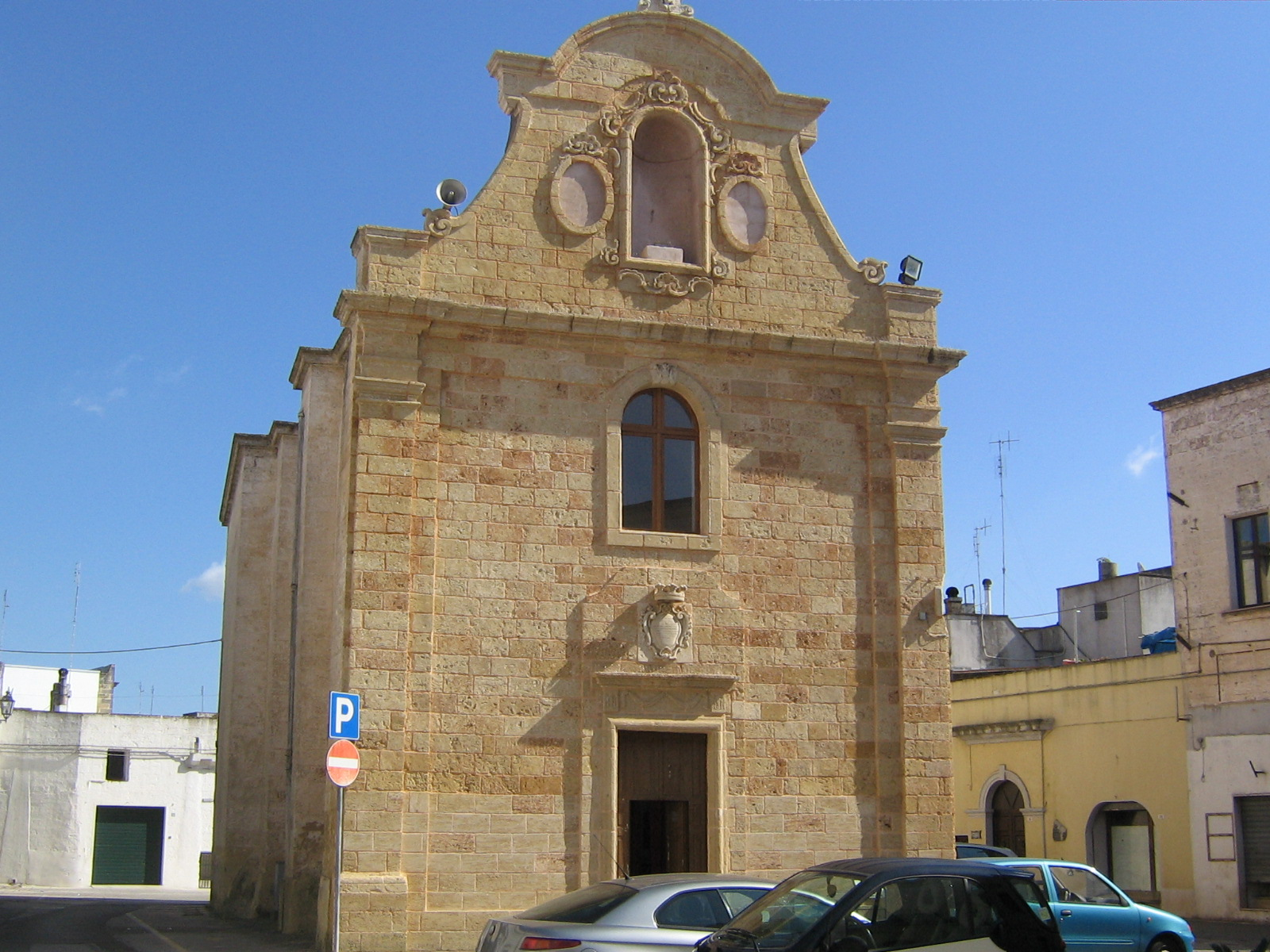 Chiesa San Giovanni Battista, Acquarica del Capo